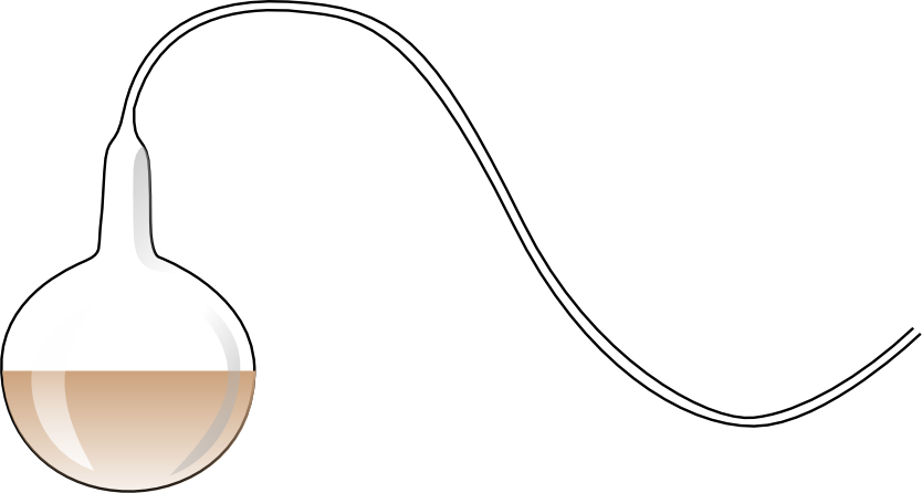 Col_de_cygne